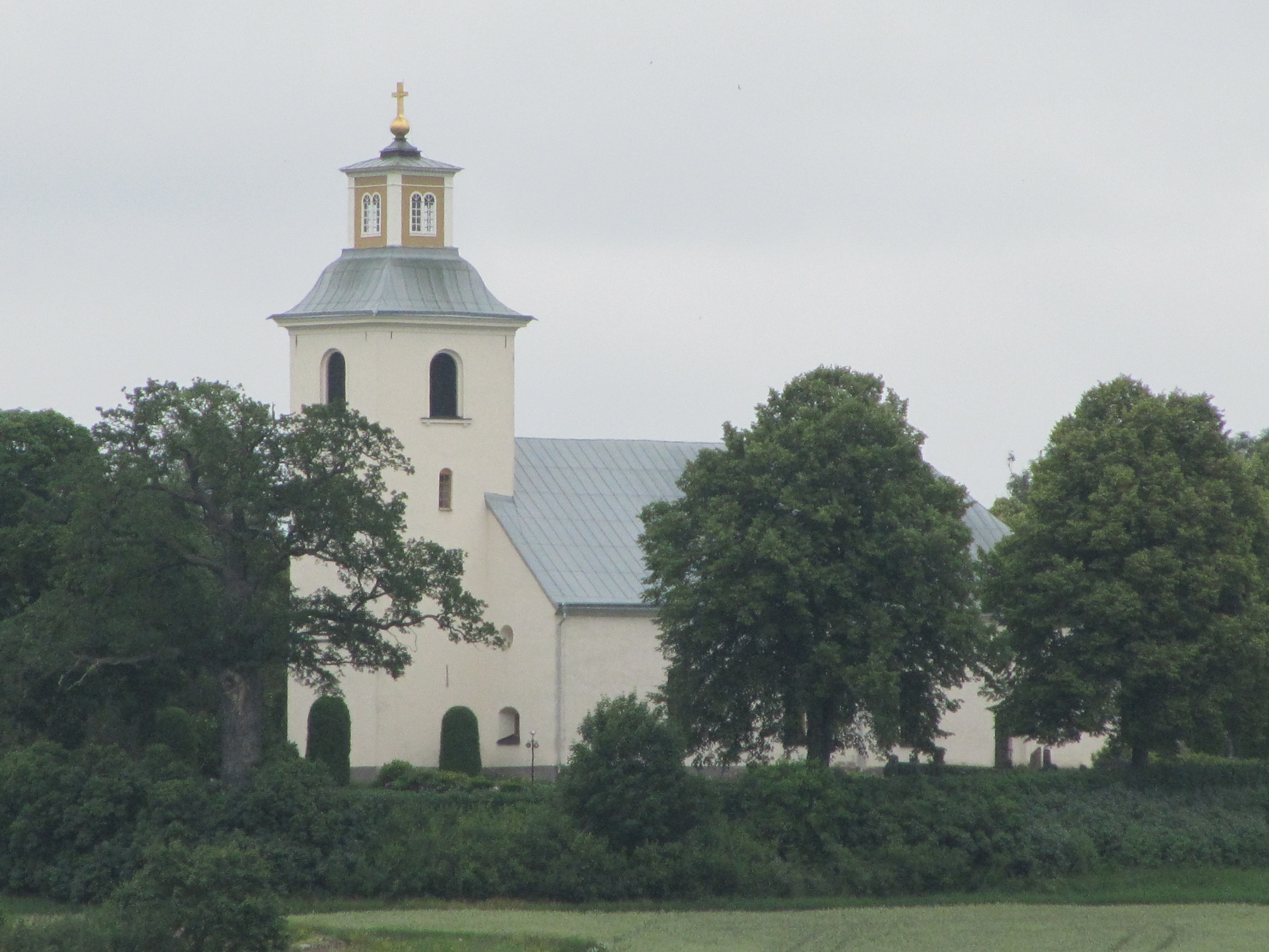 Kättilstads kyrka